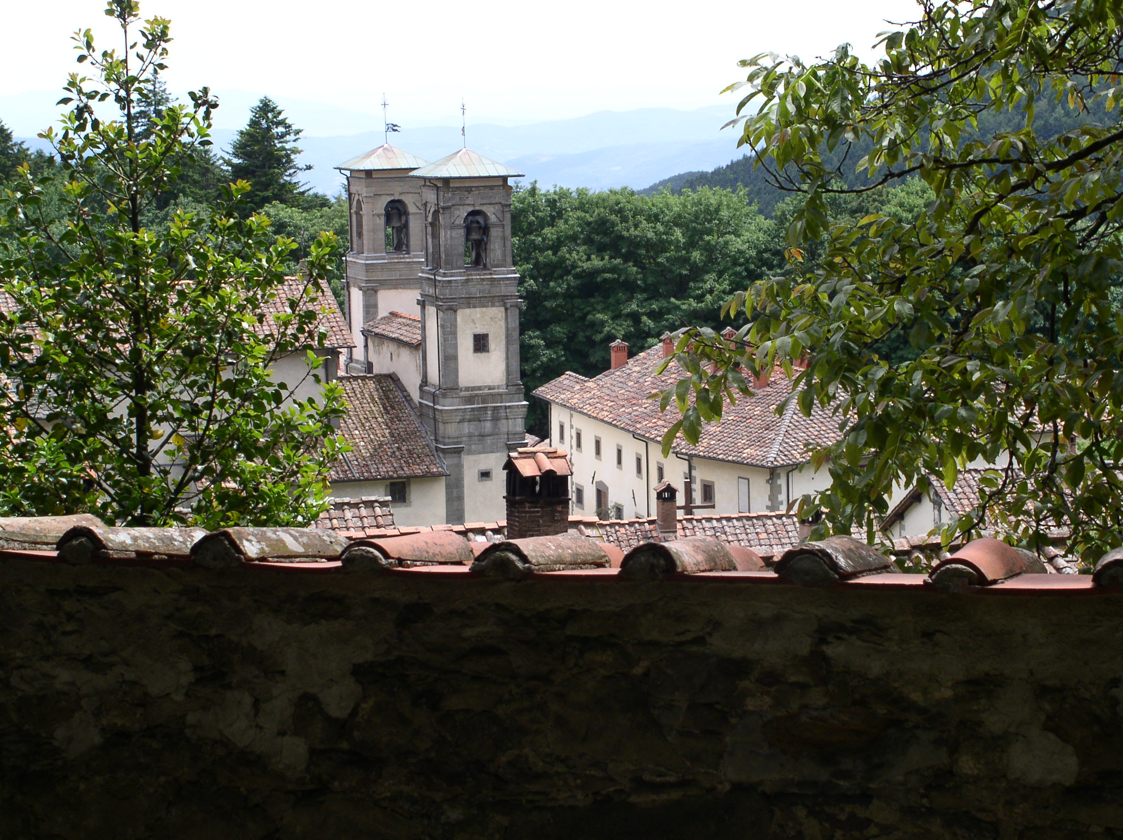 Camaldoli